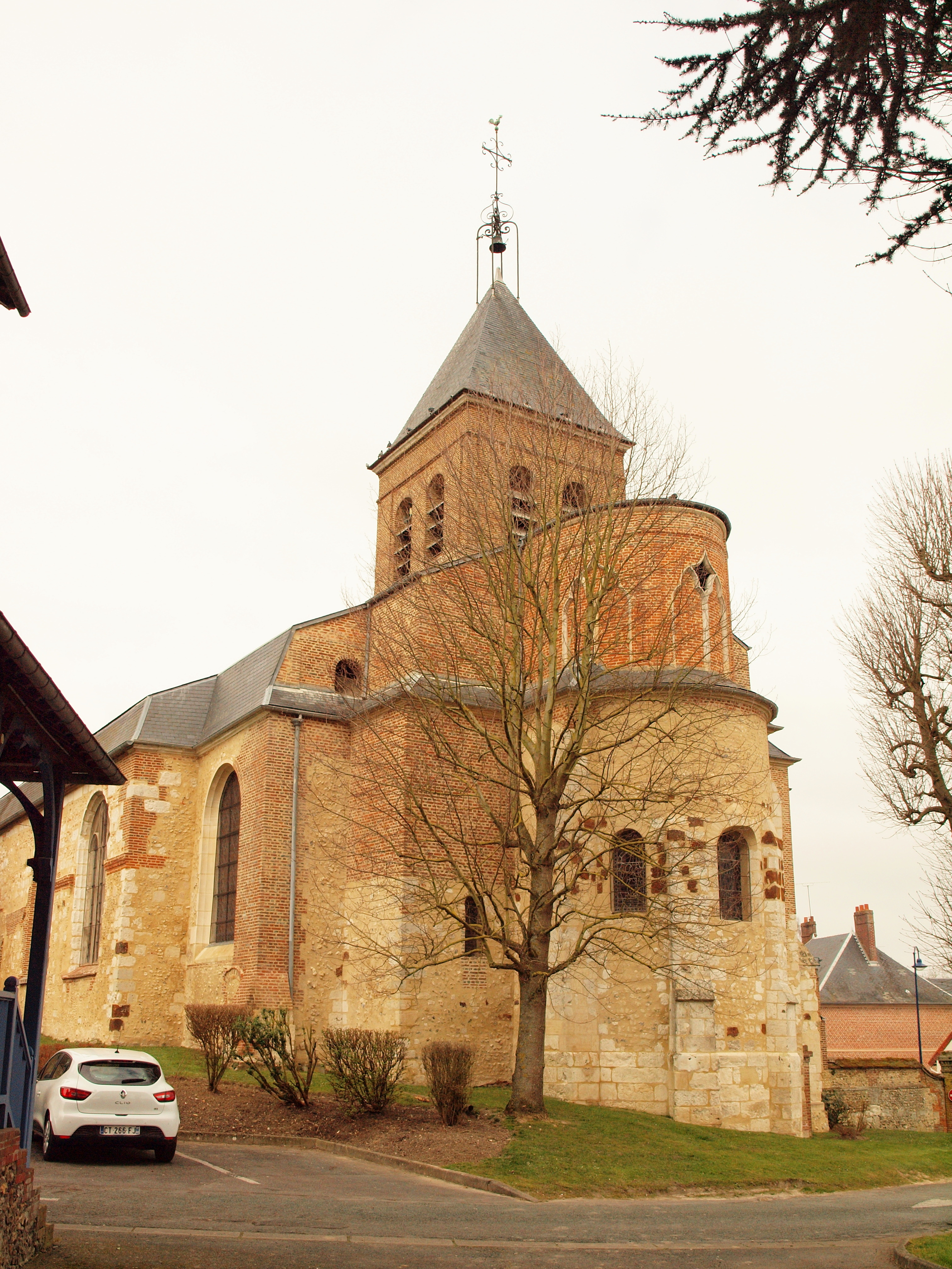 Auneuil (Oise, France)